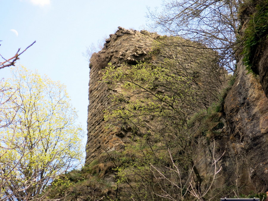 castell de Rupit - Osona / Catalunya